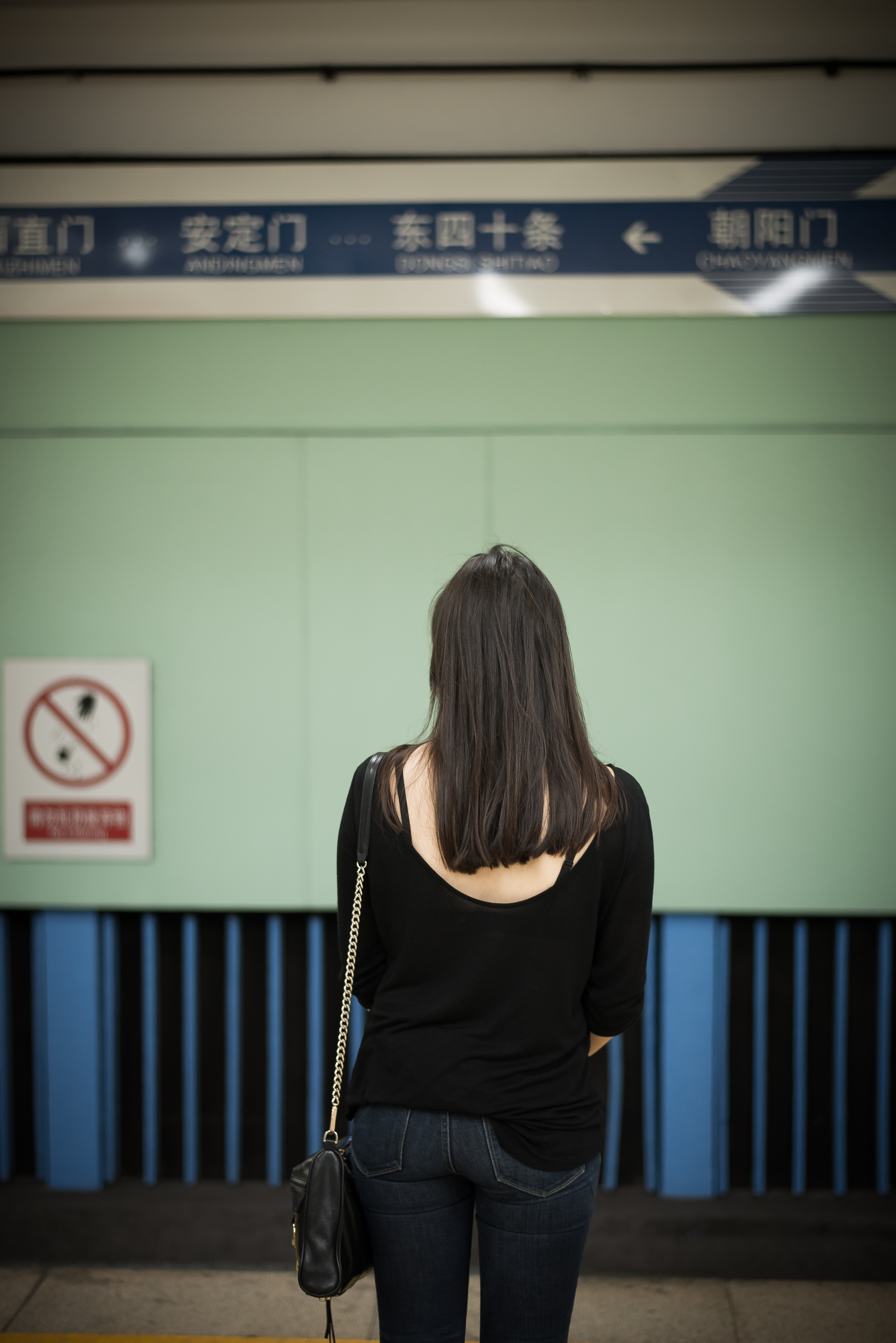 _DSC2862